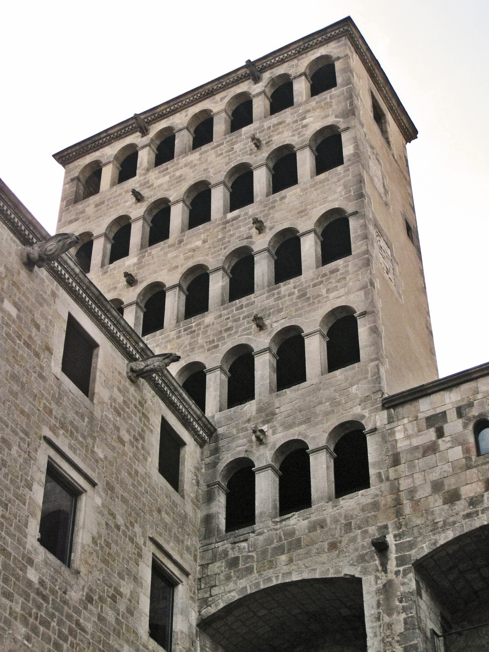 El mirador del Rei Martí (155), al Palau Reial Major (s. XIV), entre el palau del Lloctinent i el saló del Tinell, vist des de la plaça del Rei, al barri Gòtic de Barcelona